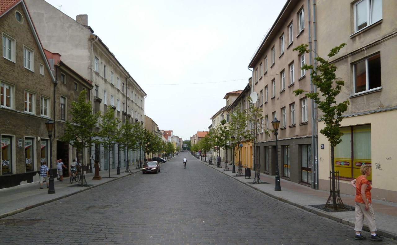 Klaipėda - Tiltų gatvė (Brückenstraße) - die ehem. Friedrich-Wilhelm-Straße